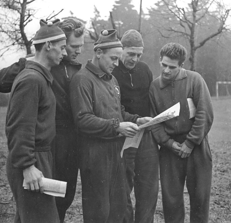 Zentralbild Kornmann 3.12.1958 Unsere Ski-Springer-Elite zur sowjetischen Berlin Note Harry Glass, Manfred Brunner, Werner Lesser, Hans Renner und Helmut Recknagel erklärten, wenn wir in den kommenden Monaten wieder auf den größten Schanzen der Welt unser Können unter Beweis stellen, wissen wir, dass wir uns dieses Können nur durch die großzügige Unterstützung unseres Arbeiter- und Bauerstaates aneignen konnten. Wir wissen auch von den katastrophalen Zuständen, die speziell im Westberliner Sport vorhanden sind. Mit der Verwirklichung der sowjetischen Vorschläge wurde u.a. auch der Sport in Westberlin aus seiner mißlichen Lage herauskommen können. UBz: Von links nach rechts: Harry Glass, Manfred Brunner, Werner Lesser, Hans Renner und Helmut Recknagel.